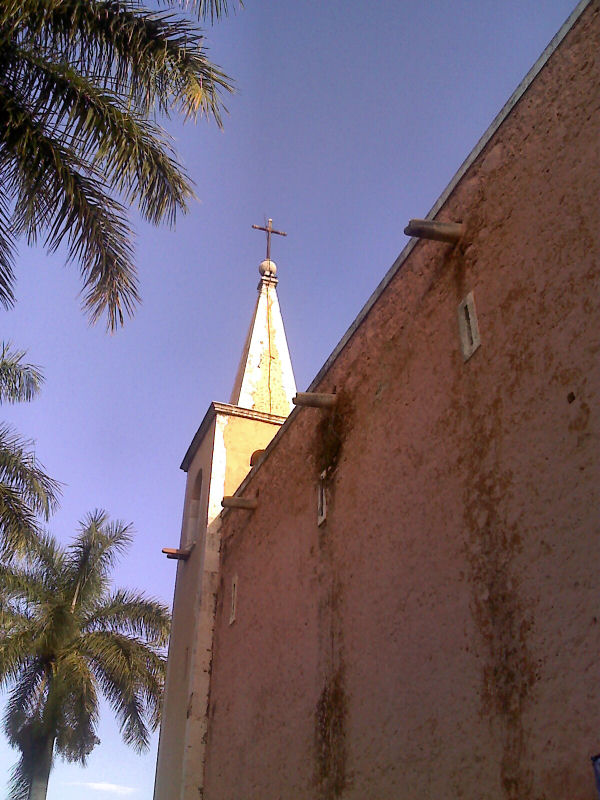 Cruz en torre de la iglesia de Santa Ana en Mérida, Yucatán.